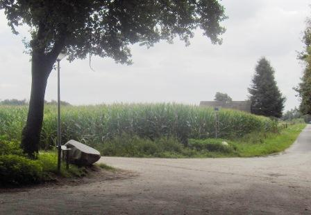 De Zevenmarkensteen bij De Kiel, Schoonoord